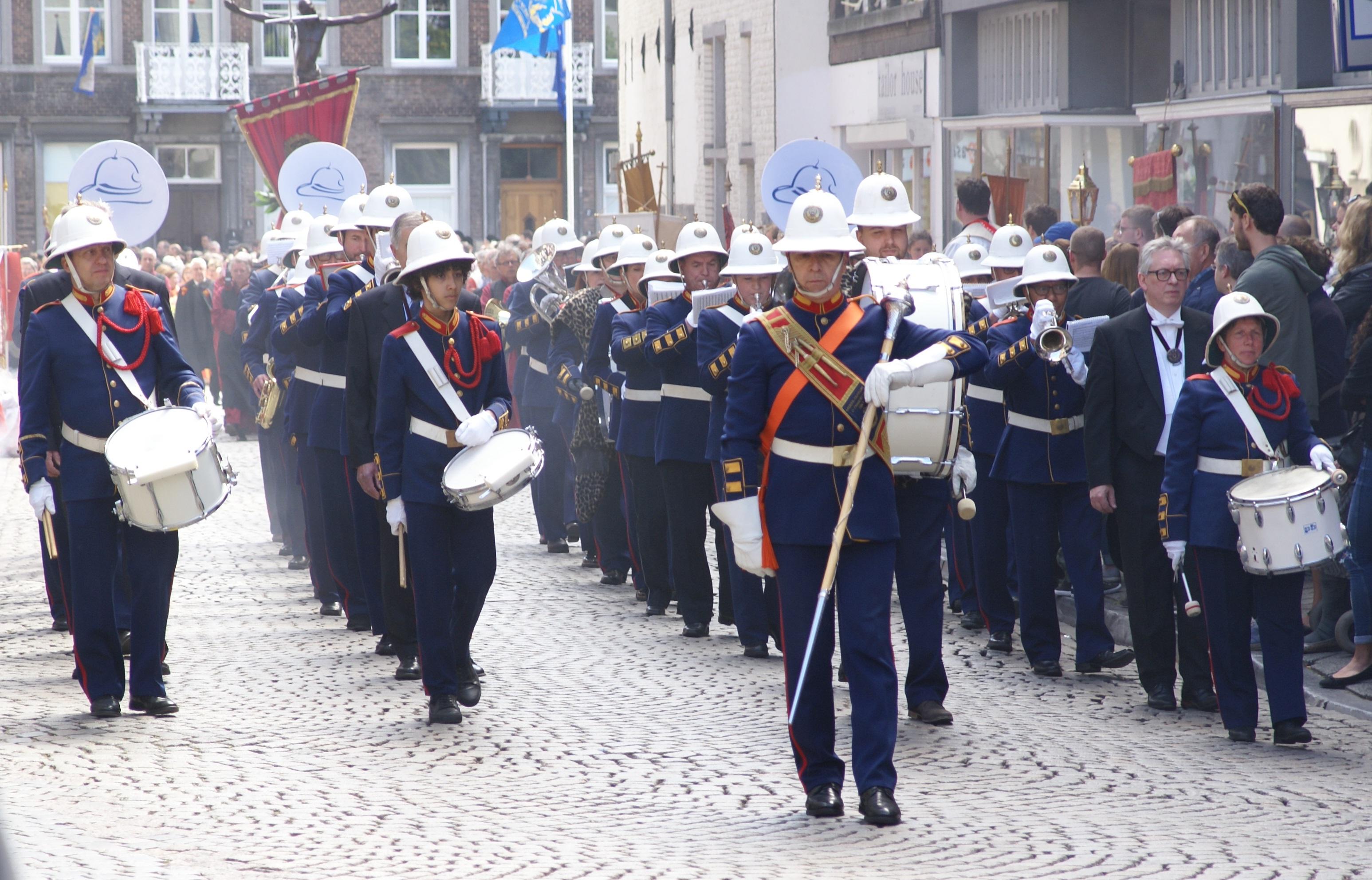 R.K. Wieker Fanfare St. Franciscus in de stadsprocessie van Maastricht.